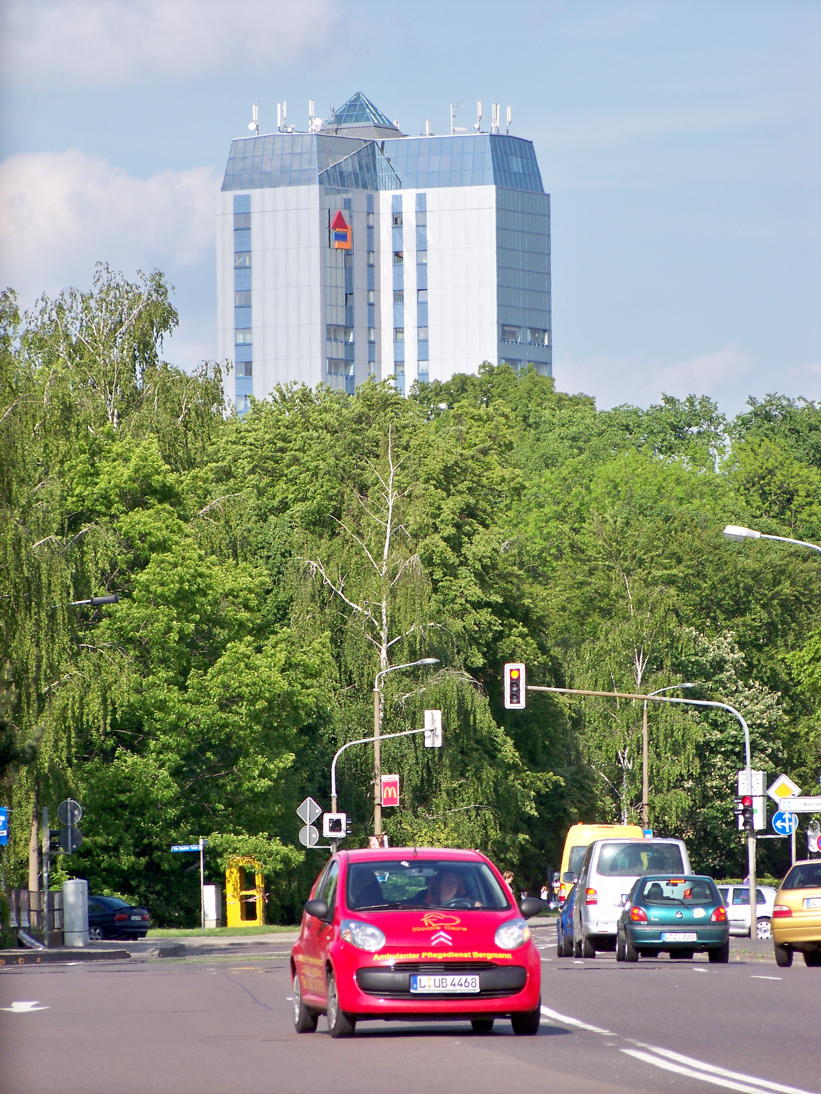 Hochhaus in Borna/Sachsen